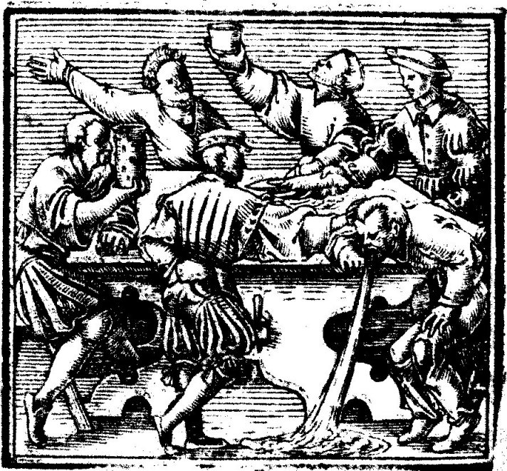 Von dem allerbesten Land so auff Erden ligt